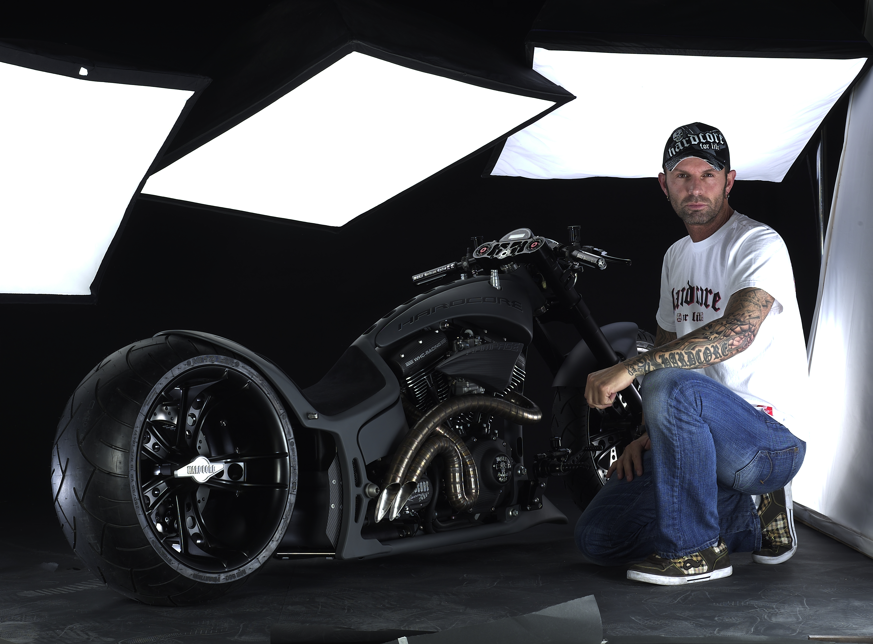 Marcus Walz mit einem seiner weltberühmten "Hardcore-Bikes", hier die "RAMPAGE" aus 2010, die eines seiner letzten persönlich von ihm gebauten Hardcore Bikes war, bevor er die Firma Walz Hardcore Cycles im Dezember 2010 verkaufte.